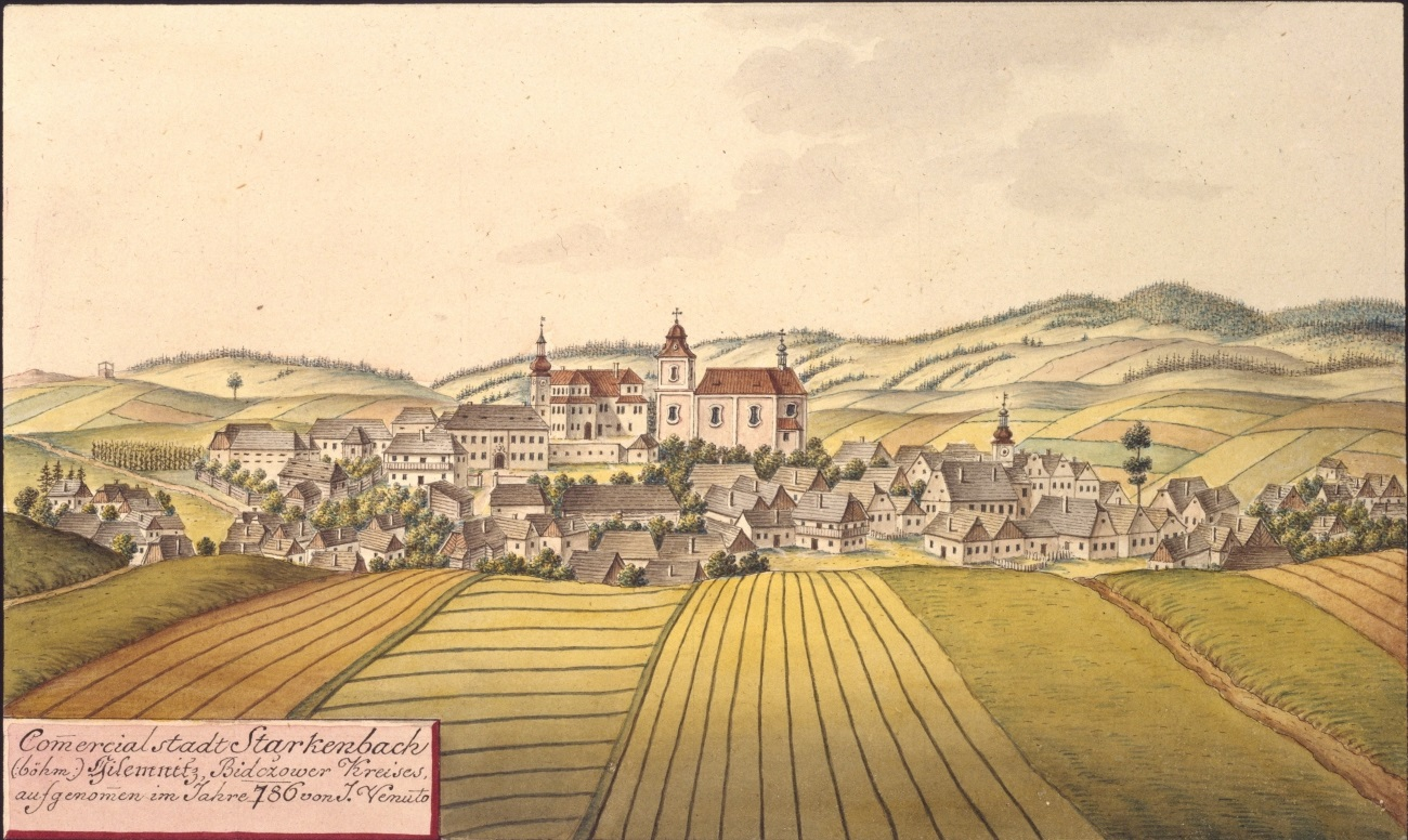 Jilemnice. Commercialstadt Starkenbach böhm Gilemnitz, Bidcžower Kreises aufgenommen im Jahre 1786 von J. Venuto